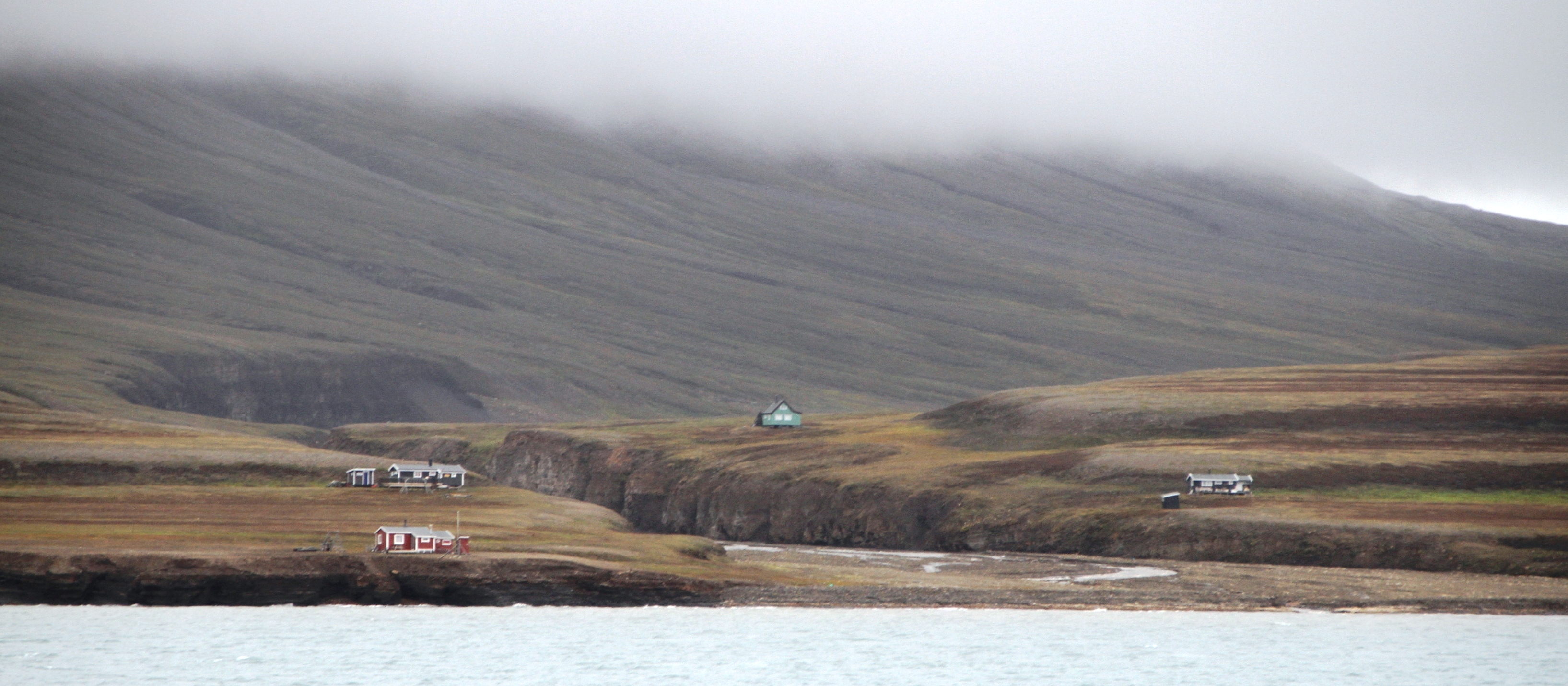 Reveneset (Adventfjorden) 100 ys old coal mining site, a cultural heritage site at the coast of Nordenskiöld Land, central Spitsbergen, Svalbard.